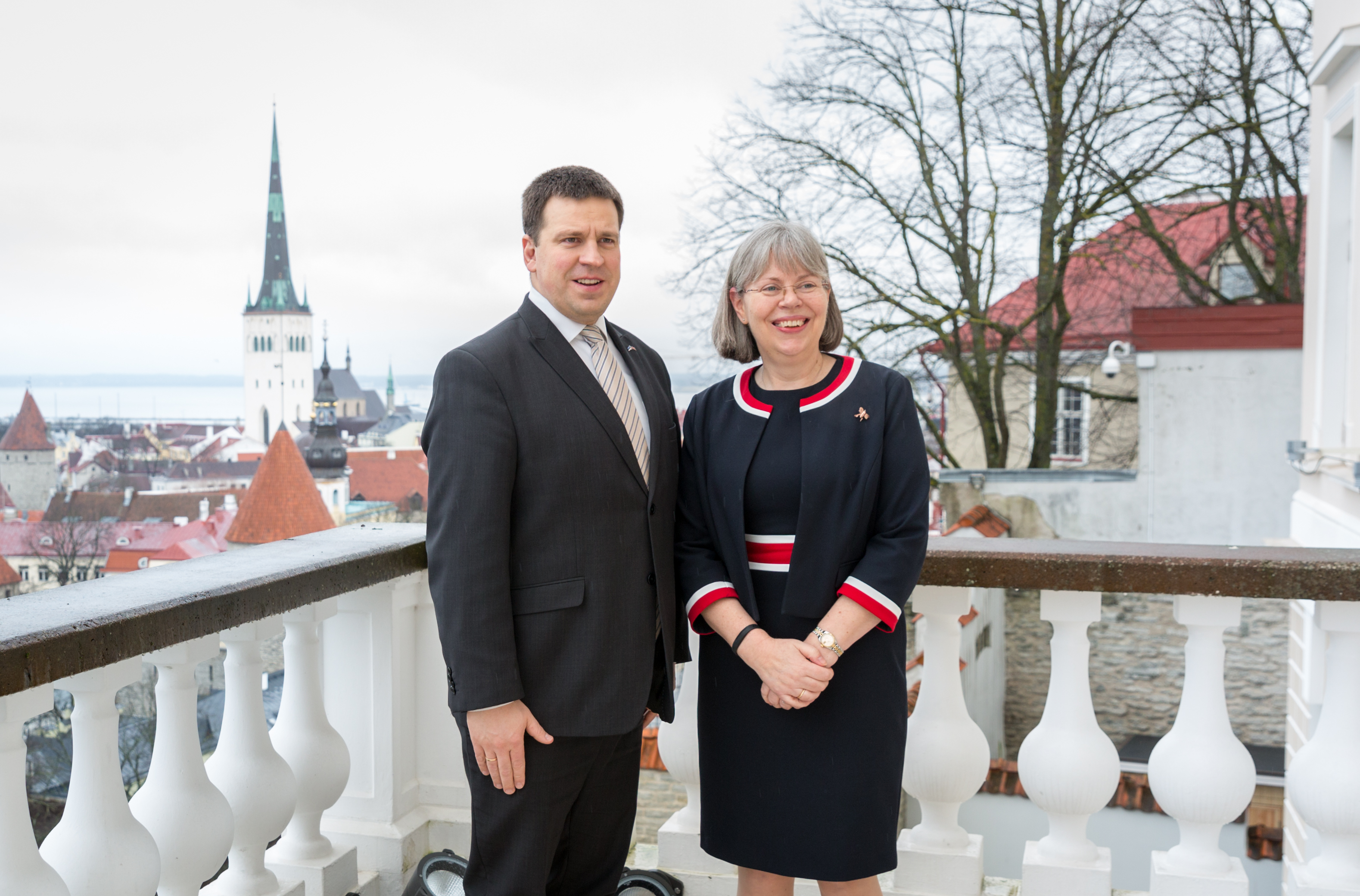 Briti suursaadik Theresa Bubbear Stenbocki majas